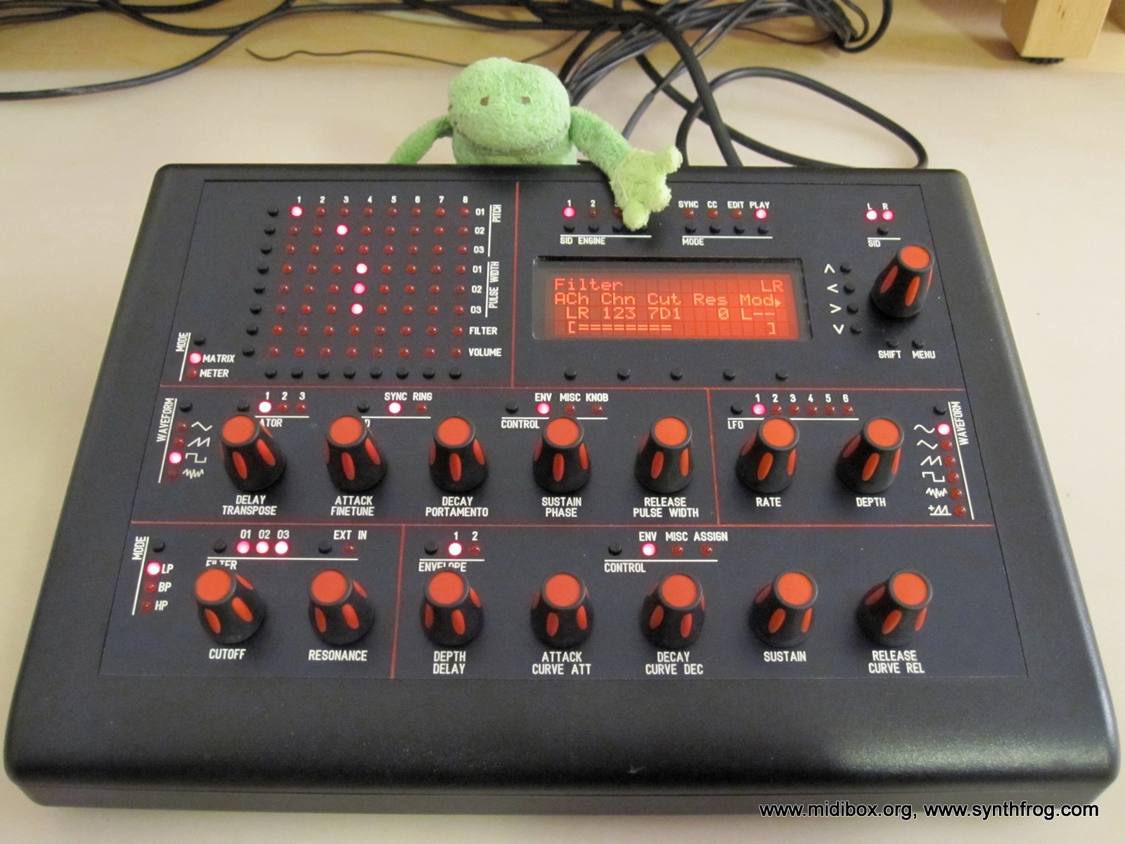 MB-6582 - MIDIbox SID Synthesizer V2